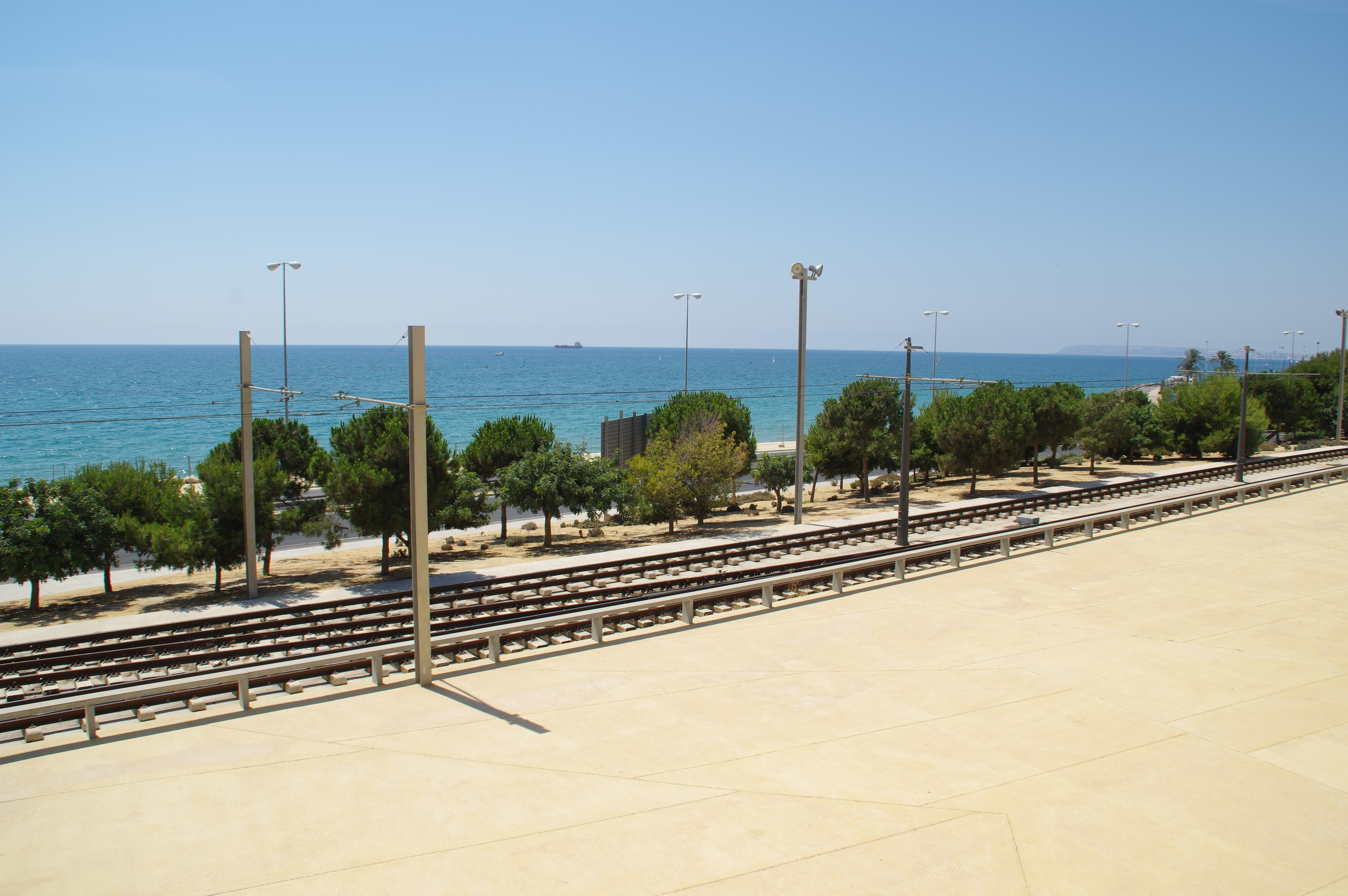 ®s K3 SD Ð ┼ ALICANTE TRAM APEADERO de SANGUETA